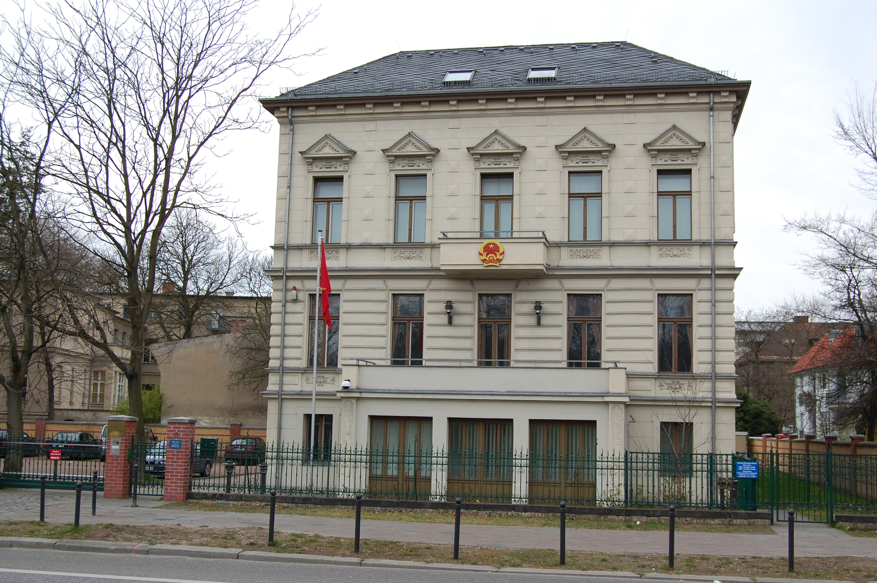 Embassy of Vietnam in Berlin. Das Botschaftsgebäude in der Elsenstraße 3 im Berliner Ortsteil Alt-Treptow, Bezirk Treptow-Köpenick.